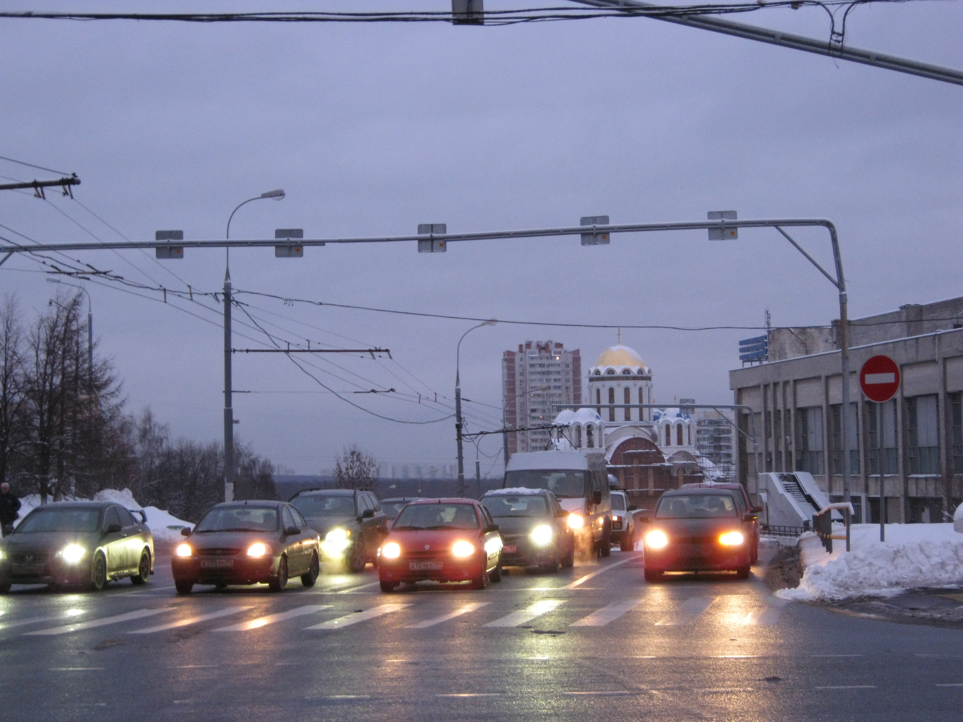 Вид на храм с пересечения Литовского бульвара, улицы Айвазовского и Тарусской улицы